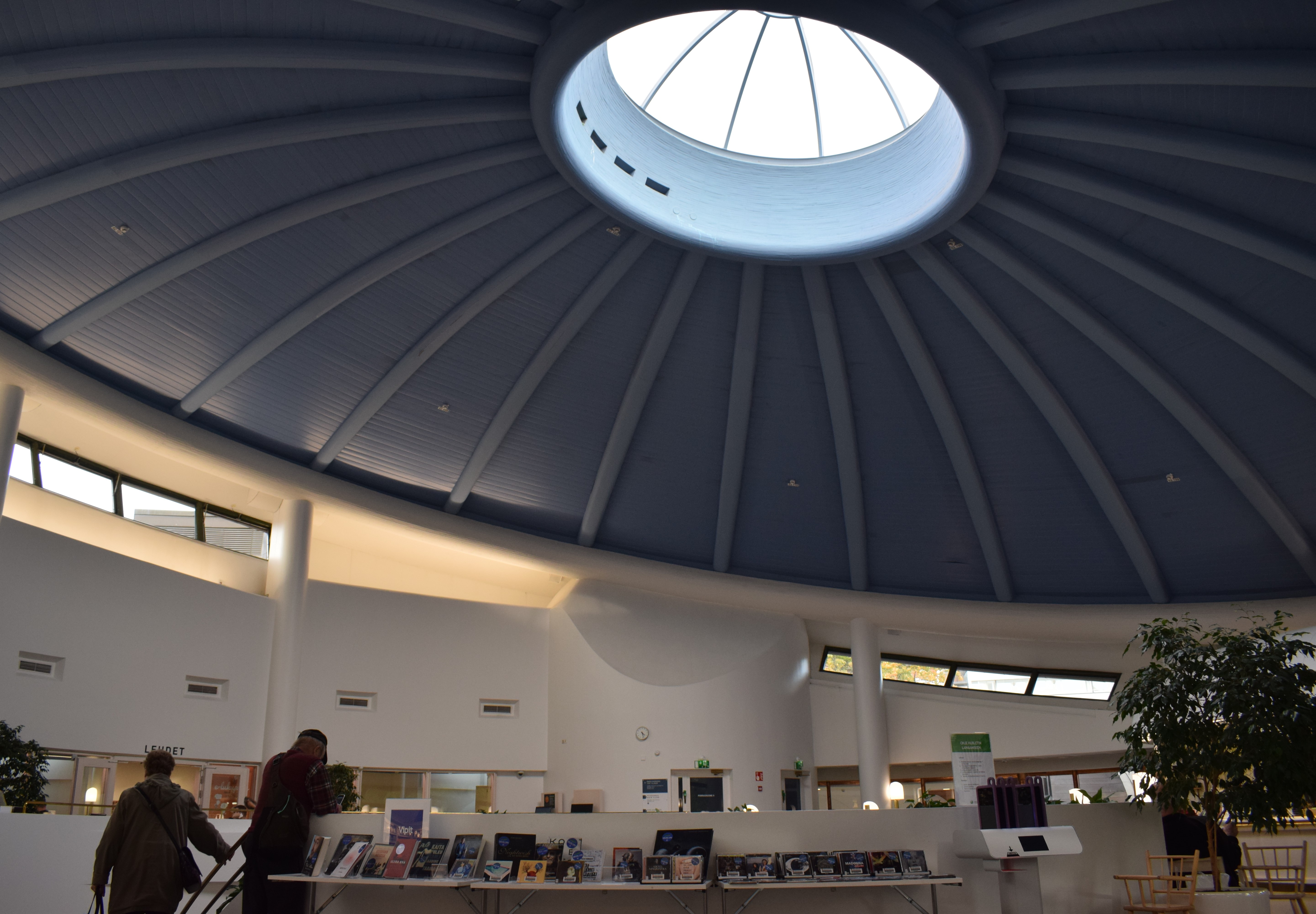 Tampereen kaupungin pääkirjasto This is a photo of a monument in Finland identified by the ID 'Main Library of Tampere City Library' (Q11896298)